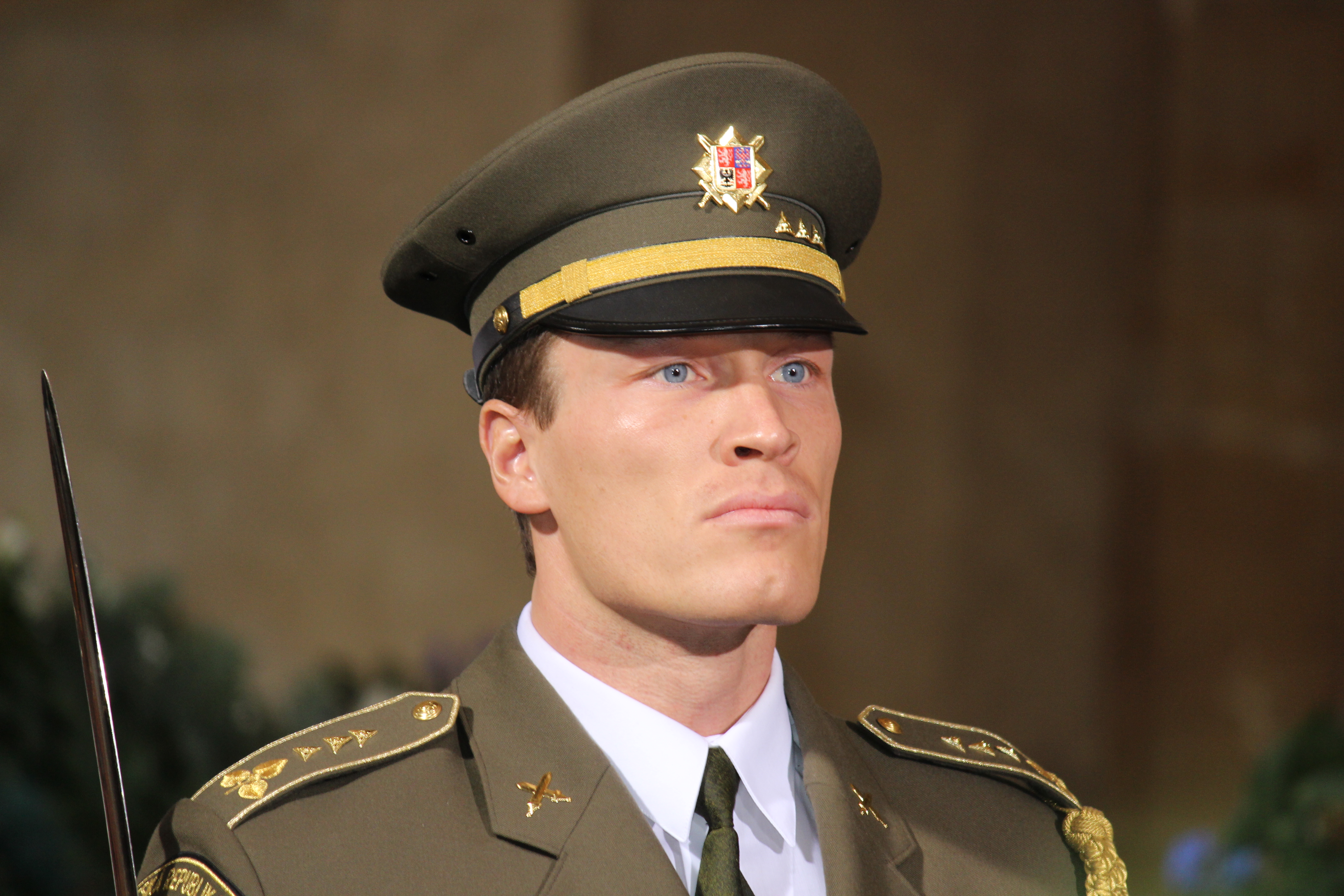 Ve středu 21. 12. 2011 byla rakev s ostatky Václava Havla přemístěna z Pražské křižovatky do Vladislavského sálu Pražského hradu. Vyfocen nadporučík Čestné stráže Armády České republiky. This photograph was taken with a DSLR from WMCZ's Camera grant.